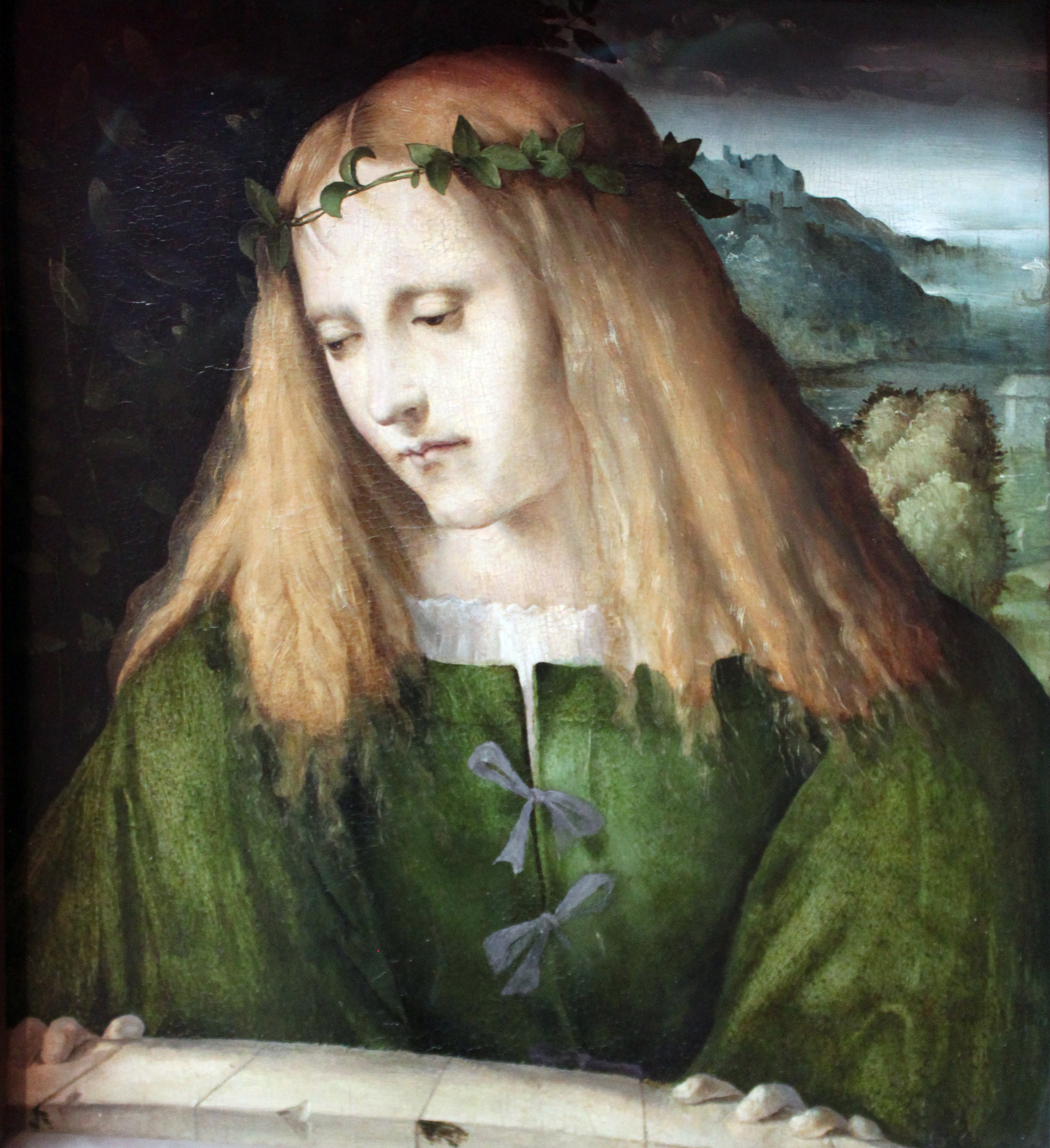 Nach Ovid in den Metamorphosen berichtet, verliebte sich Narziß so sehr in sein unerreichbares Abbild, dass er vor Gram darüber starb. Durch Beschneidung wurde das Bild entfremdet. Im 19. Jahrhundert wurde der androgynen Jüngling durch wenige Übermalungen in eine heilige Katharina mit dem Rad verwandelte. Diese Übermalungen sind heute entfernt